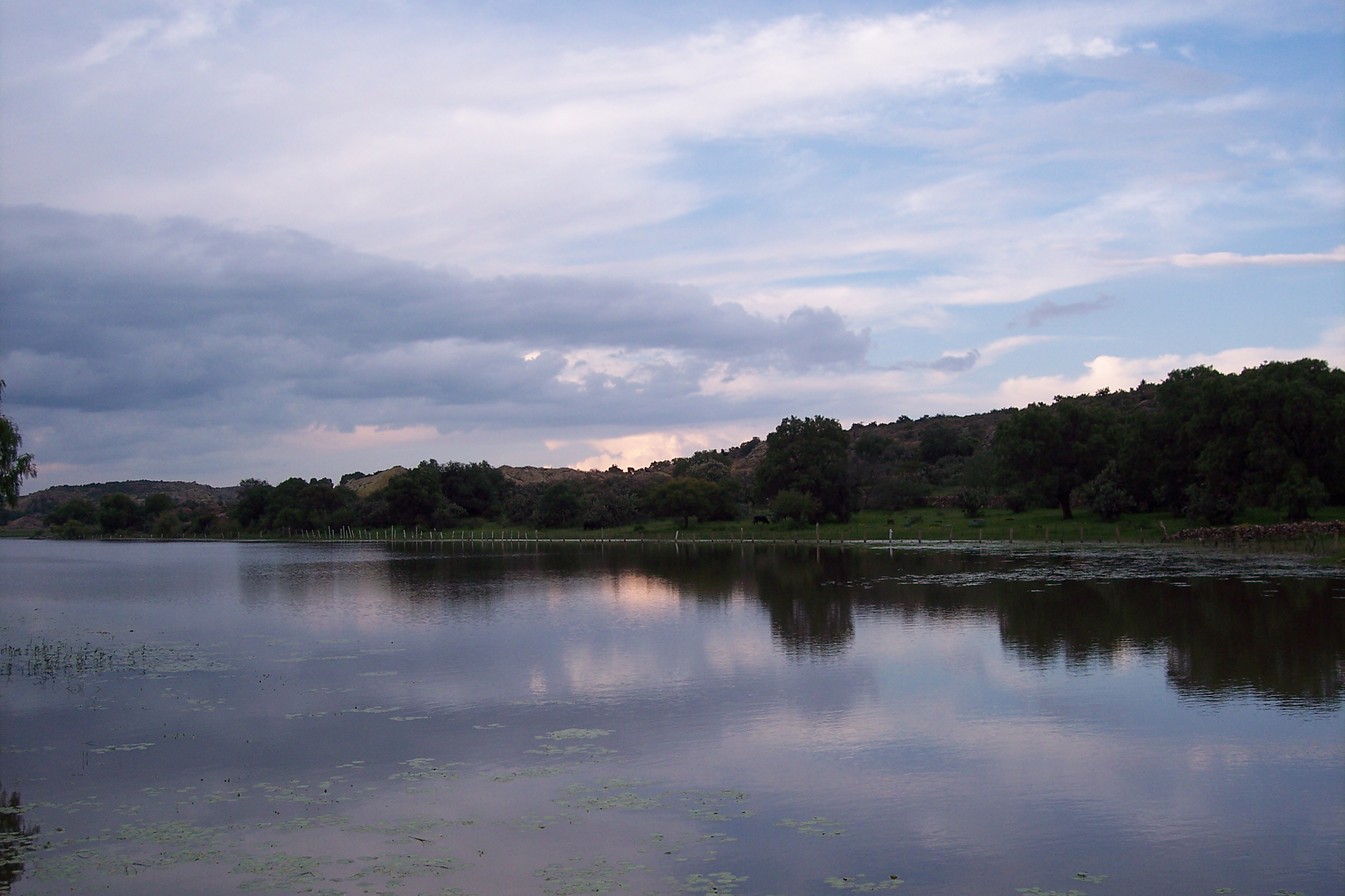 Se encuentra cerca de Ojuelos de Jalisco, Jalisco, por la carretera hacia Aguascalientes. La salida es por la llamada "curva de chinampas", muy pronunciada por cierto. See where this picture was taken. [?]